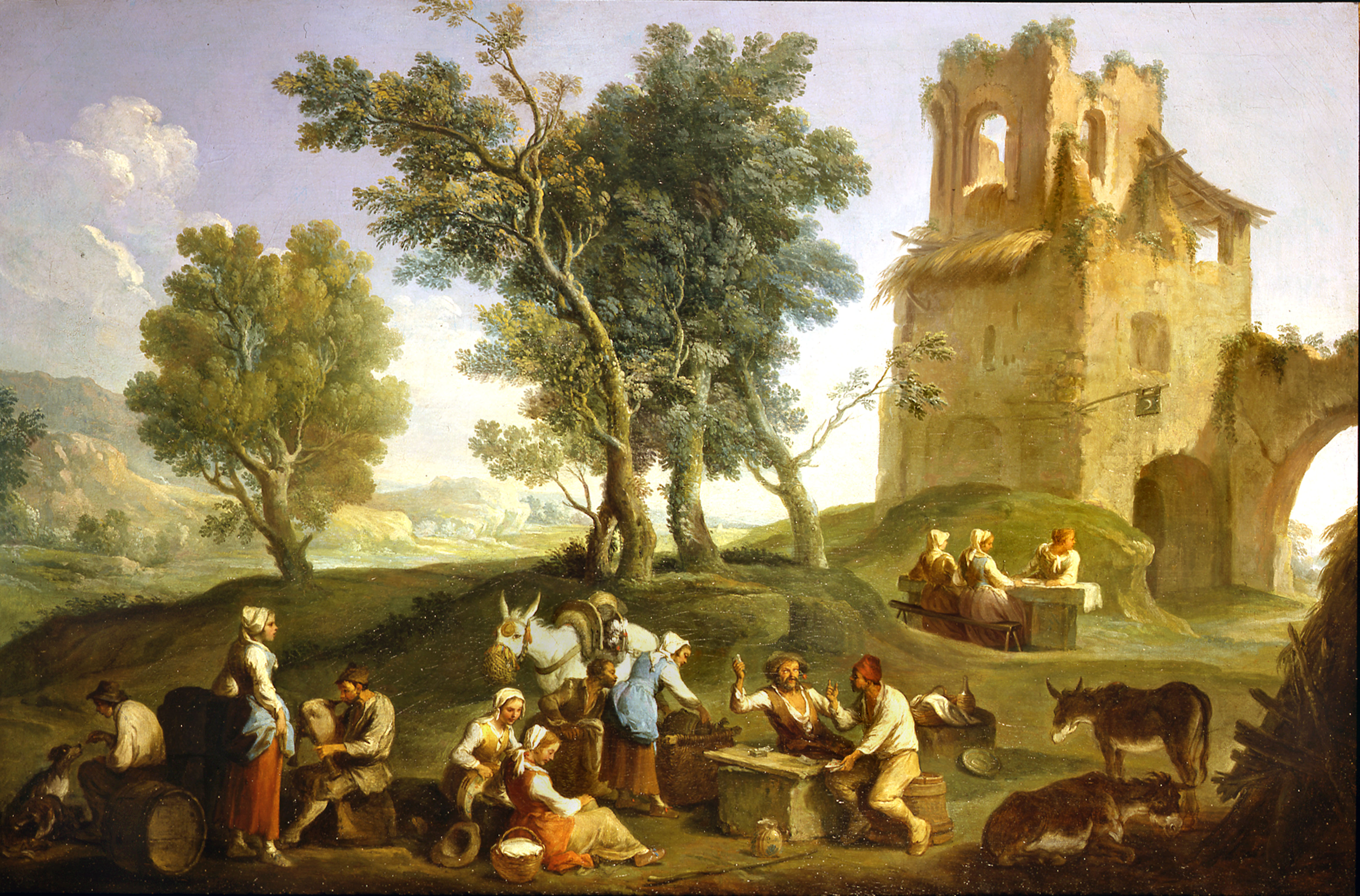 Bambocciata, scena rurale, Collezione Mainetti, Romatitle QS:P1476,it:"Bambocciata, scena rurale, Collezione Mainetti, Roma" label QS:Lit,"Bambocciata, scena rurale, Collezione Mainetti, Roma"